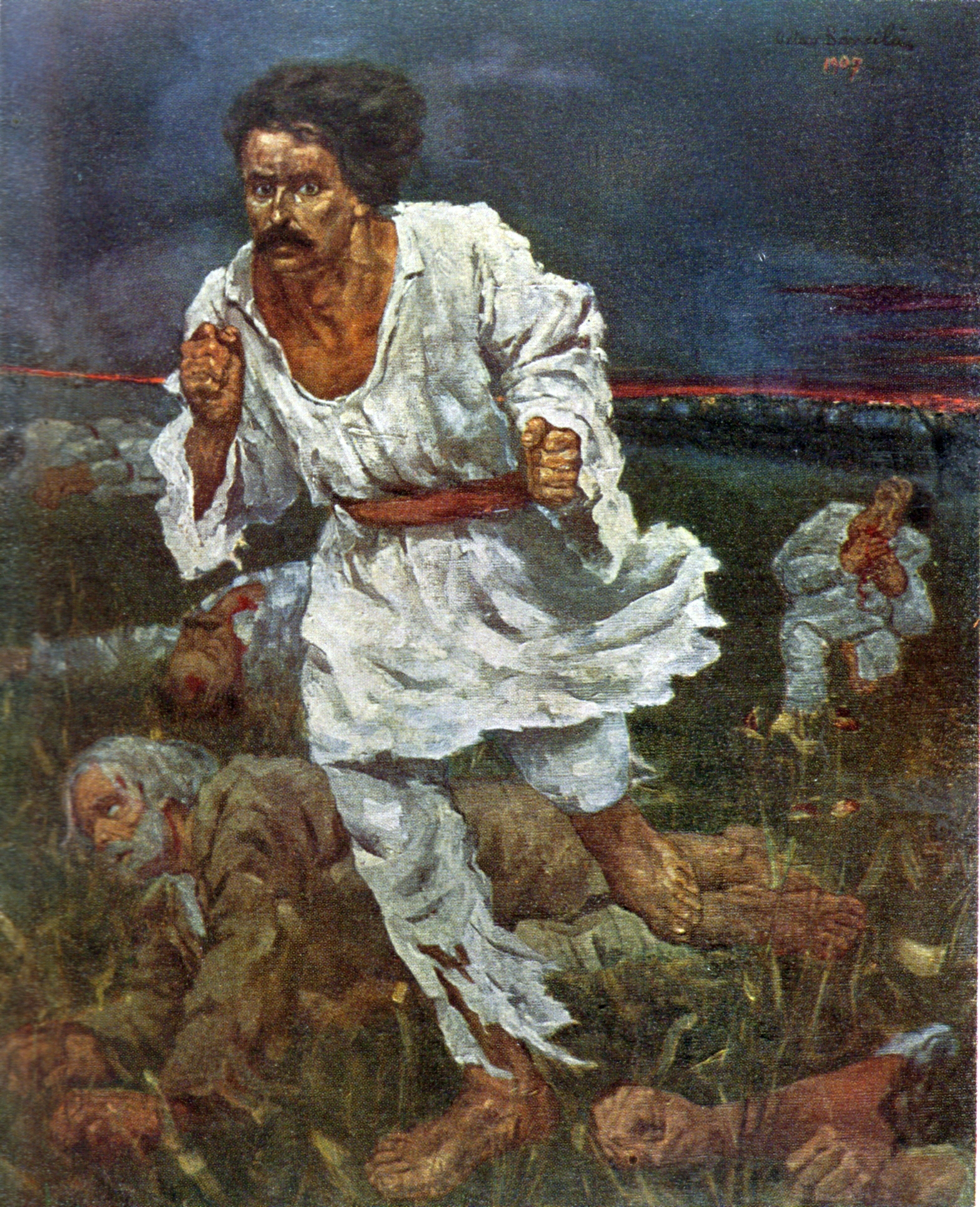 Compoziția 1907 - a fost cunoscută pe vremuri ca făcând parte, ca un fragment, dintr-o compoziție monumentală intitulată de către Octav Băncilă sub numele Pe valea Oltului. Astăzi, tabloul se află la Galeria Muzeului Național de Artă al României. Compoziția Pe valea Oltului pe care pictorul dorea s-o realizeze, a fost comentată în ziarul România Muncitoare.[1] Astfel, artistul voia să arate cum s-a tras cu tunul contra unui grup de țărani de pe valea Oltului. El voia să înfățișeze „... o grămadă de țărani, încercuită într-o vale, și bombardată mișelește de artileria de după dealuri”. Monumentala compoziție nu s-a mai realizat, ea a rămas doar la stadiul de proiect. În tabloul de la Galeria Națională, datorită dramatismului care se desprinde din compoziție și datorită tratării subiectului în mod dinamic și în același timp monumetal, impresia pe care o lasă privitorului este deosebit de puternică. Lucrarea a fost expusă în anul 1907 la Iași, în vitrina librăriei Moldova. În septembrie 1908, a fost expusă la Ateneul Român din București. Lucrarea a participat la Expoziția de artă românească de la Moscova în perioada 1949 - 1950, împreună cu încă două tablouri, Muncitorul și Peticarul. Criticul sovietic A. Tihomirov a avut următoarele considerații: ... pătrunzătoarea expresivitate a chipurilor lui Băncilă atinge un expresionism original în pânza lui cea mai patetică 1907... Pe câmpul presărat cu morți și răniți, sub focul ucigător, aleargă spre noi un țăran. Pumnii îi sunt strânși. Chipul exprimă groază și mânie. Cămașa albă se desprinde ca o pată tragică pe fondul întunecat al cerului și al câmpiei.[2]